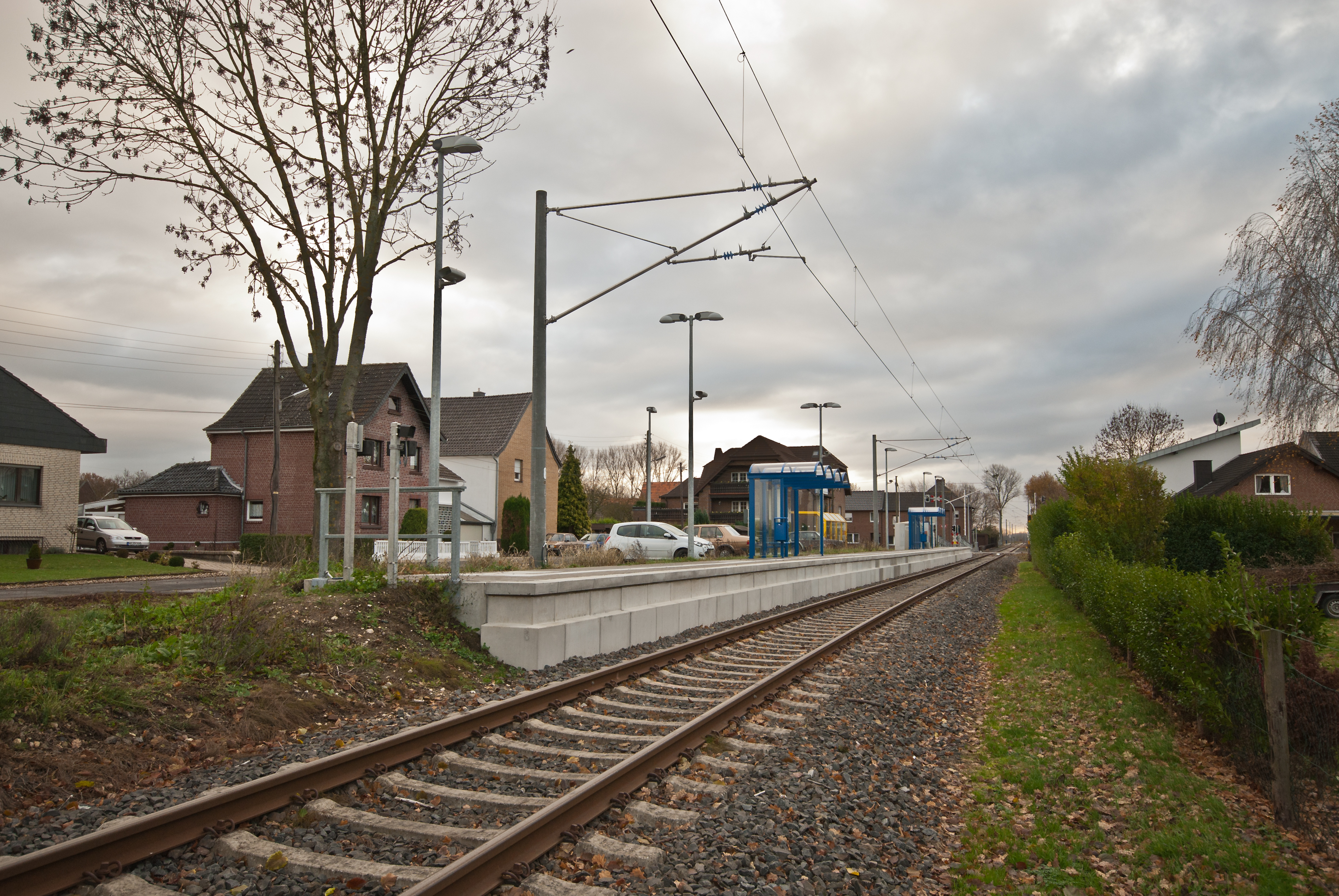 Haltepunkt Porselen an der Bahnstrecke Lindern - Heinsberg (Rheinl) in der neu wiederhergestellten Form. Bahnsteiglänge 140 m. Blickrichtung der Bahnstrecke in Richtung Lindern.